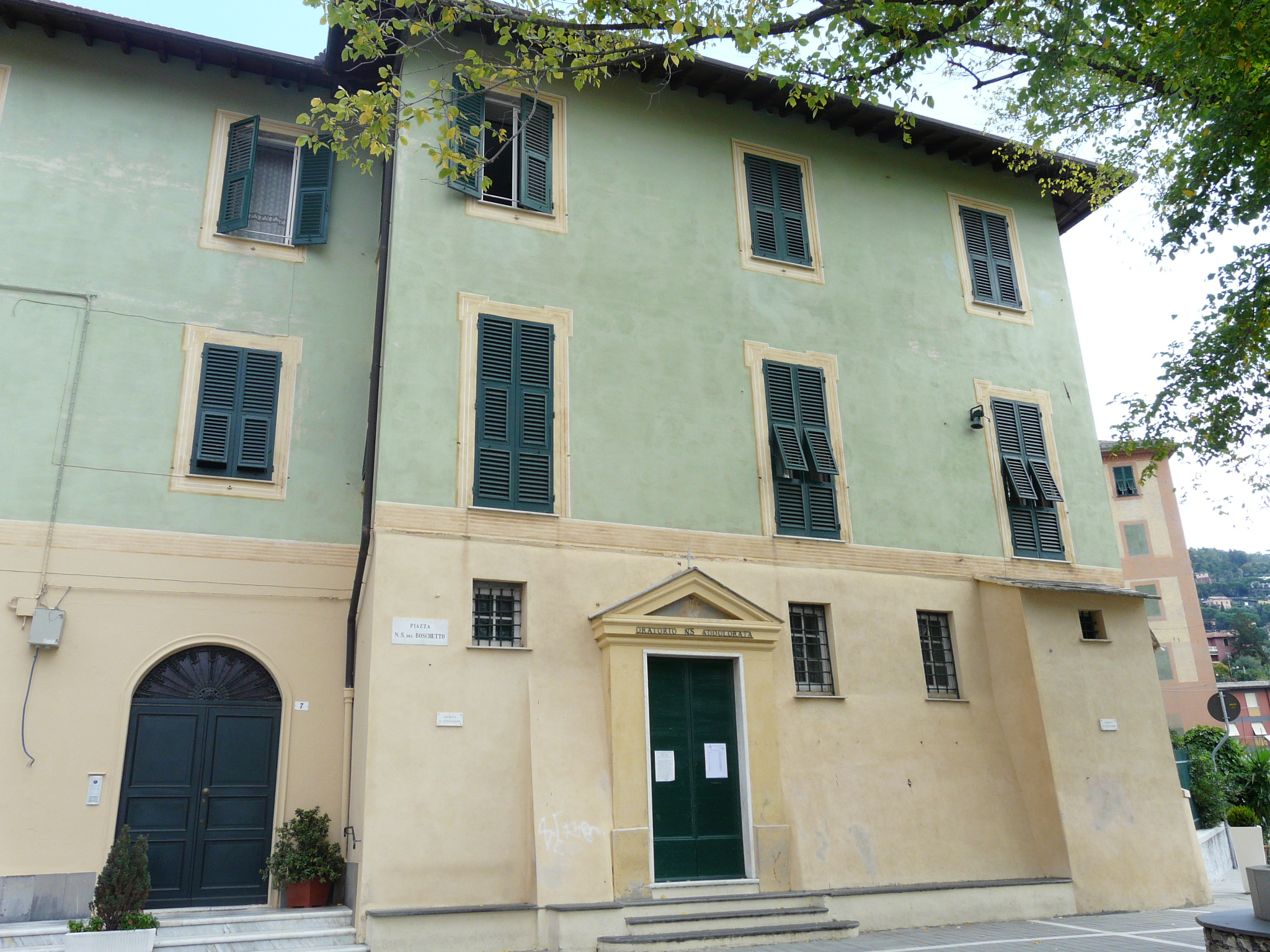 Santuario di Nostra Signora del Boschetto, Camogli, Liguria, Italia